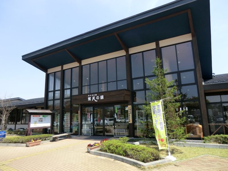 梵天の湯 2012年5月